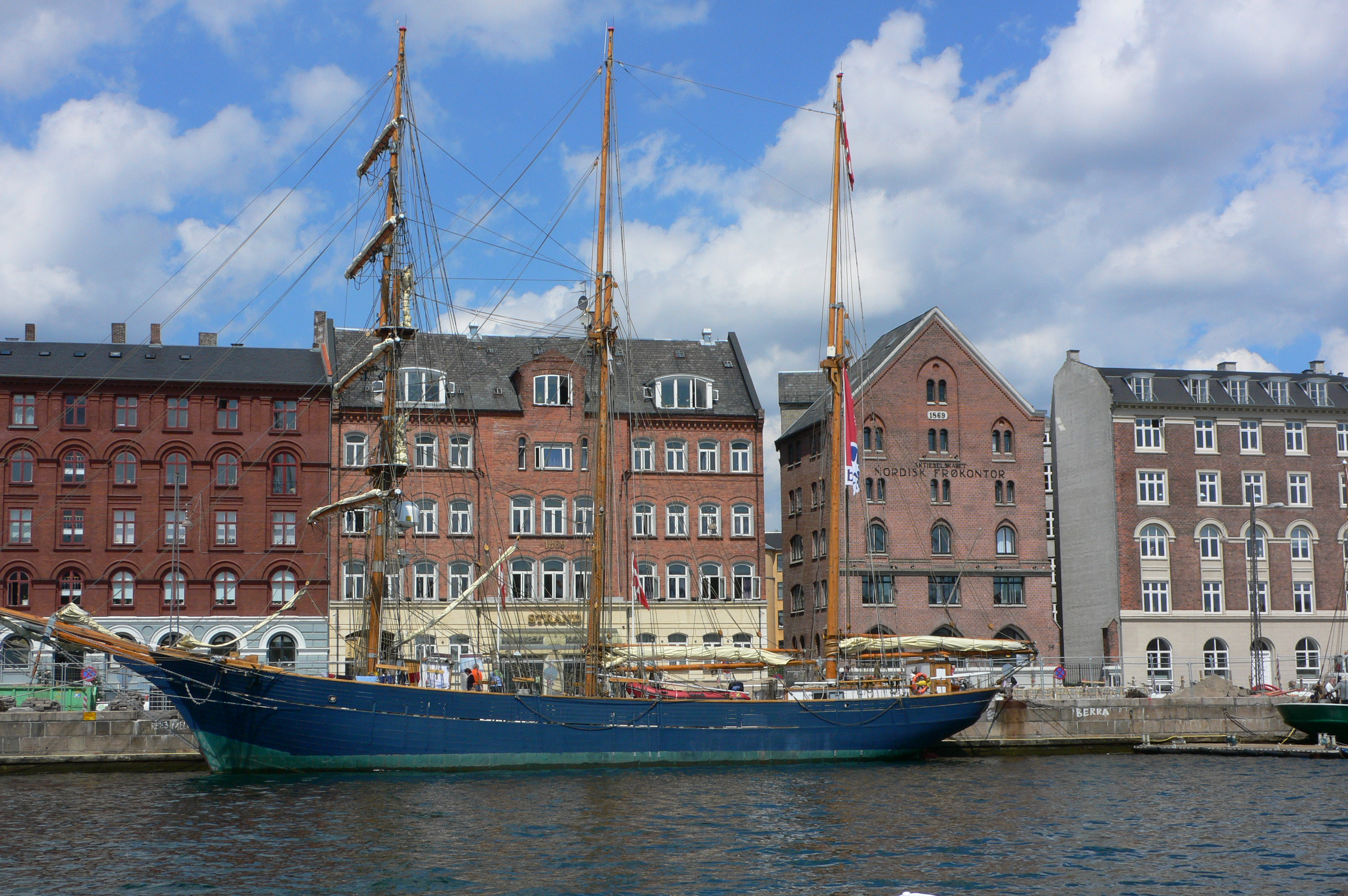 Buildings at Havnegade in Copenhagen, Denmark